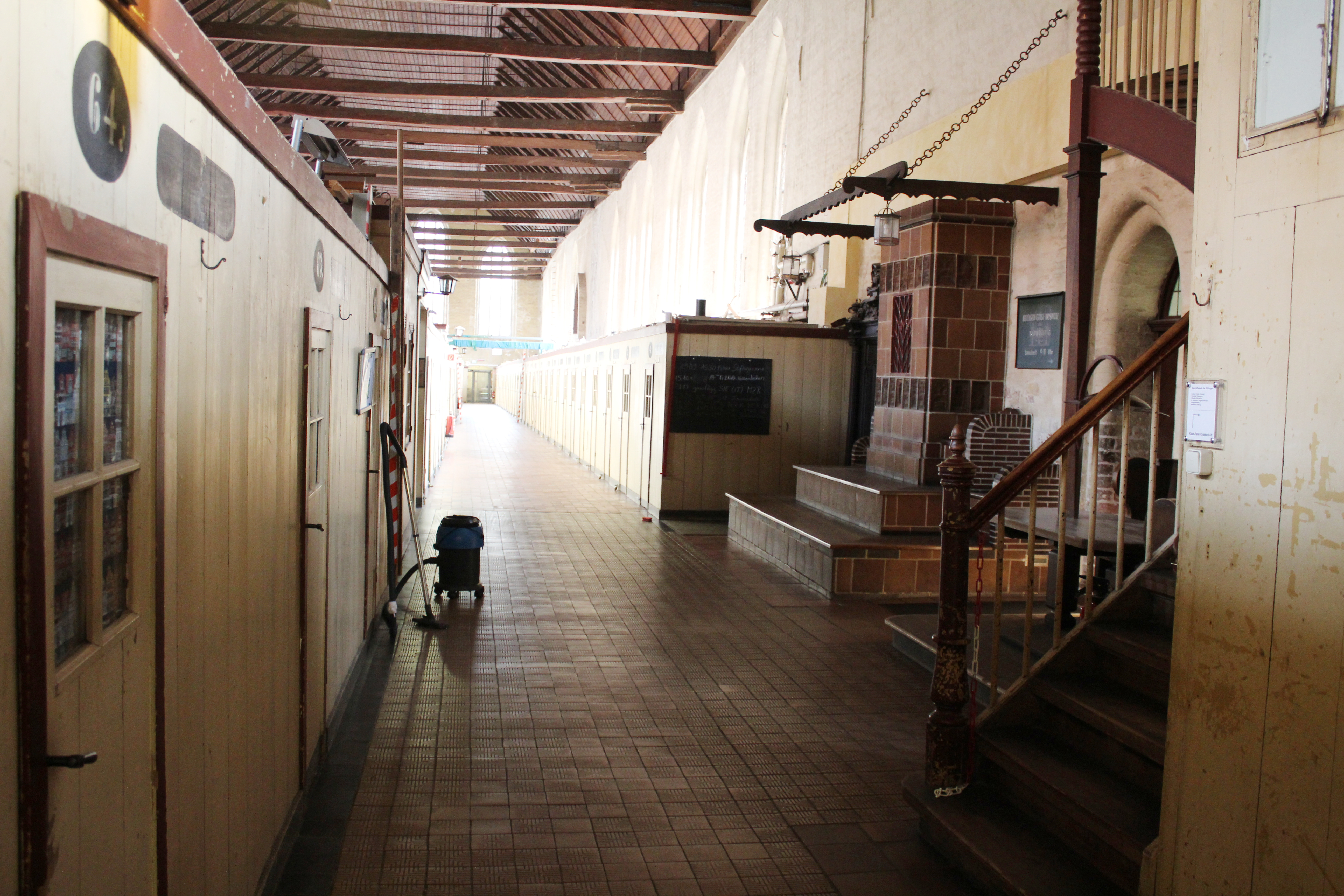 Heilig-Geist-Hospital, Lübeck, Schleswig-Holstein, Deutschland